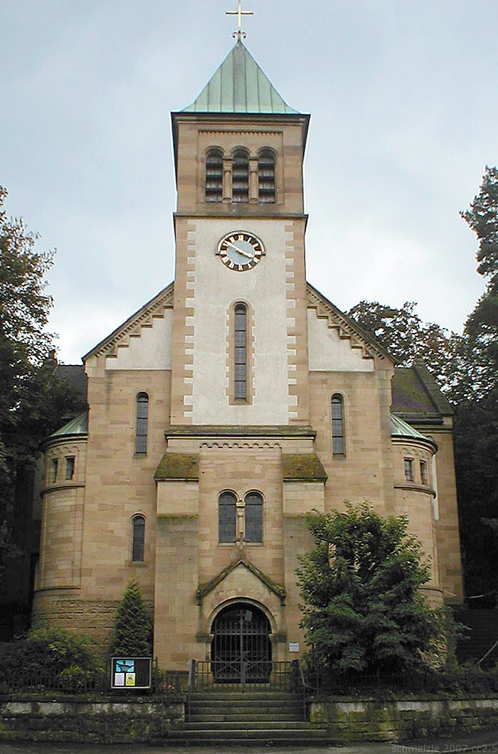 Matthäuskirche in Heilbronn-Sontheim, erbaut 1899